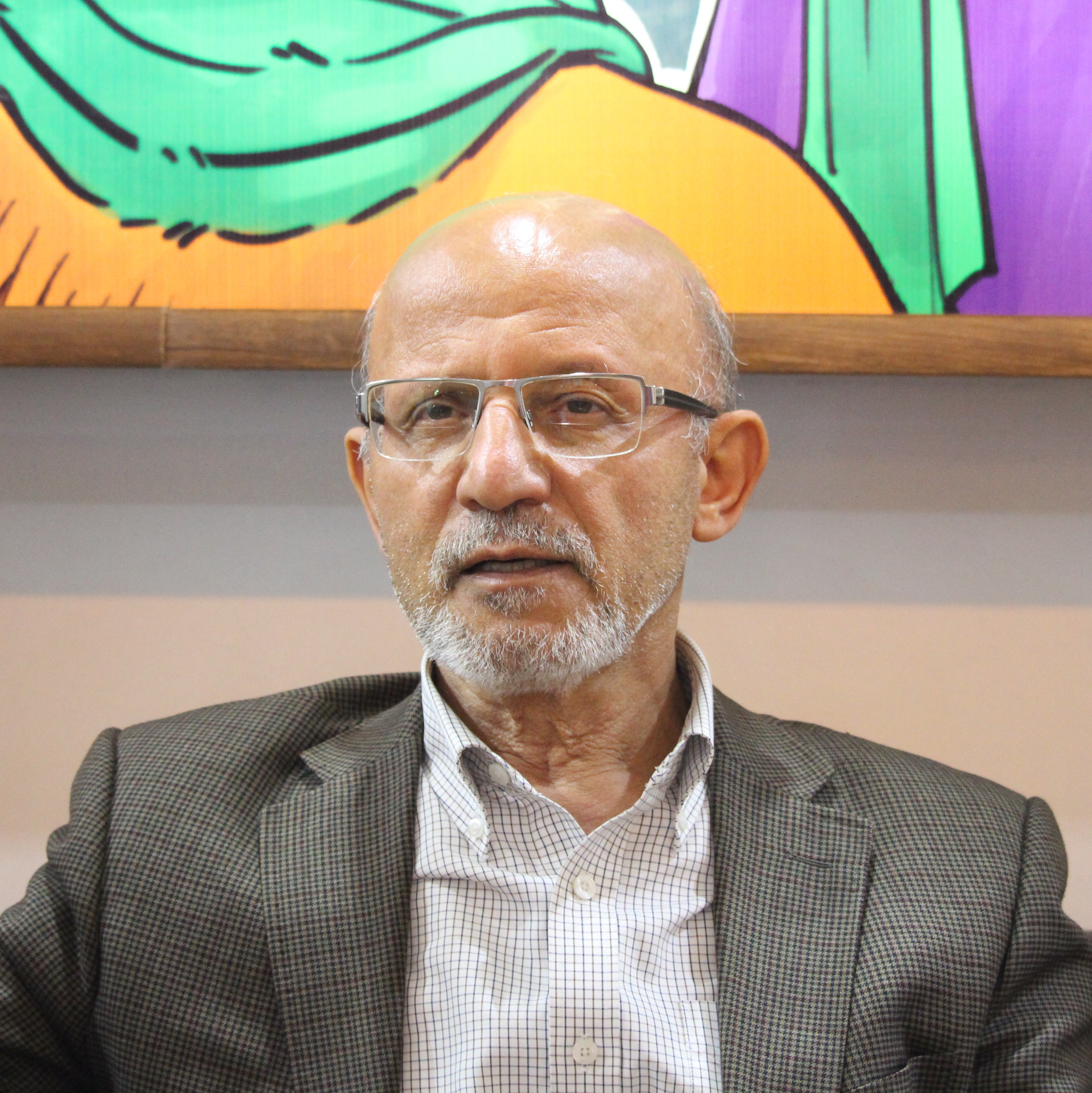 غلامرضا حیدری Gholamreza Heydari